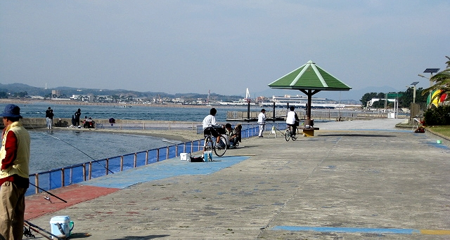 弁天島海浜公園（浜松市）